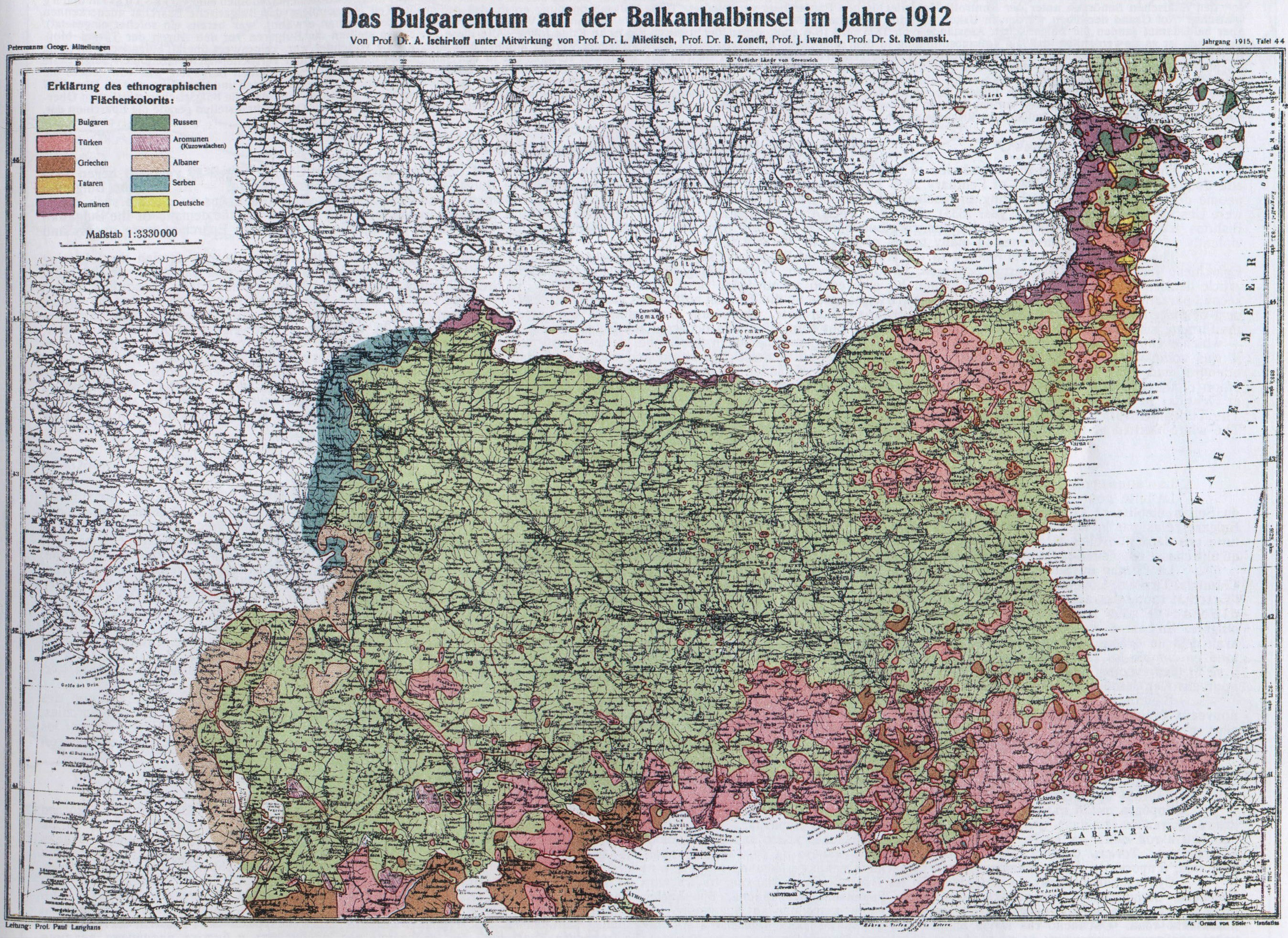 Das Bulgarentum auf der Balkanhalbinsel im Jahre 1912